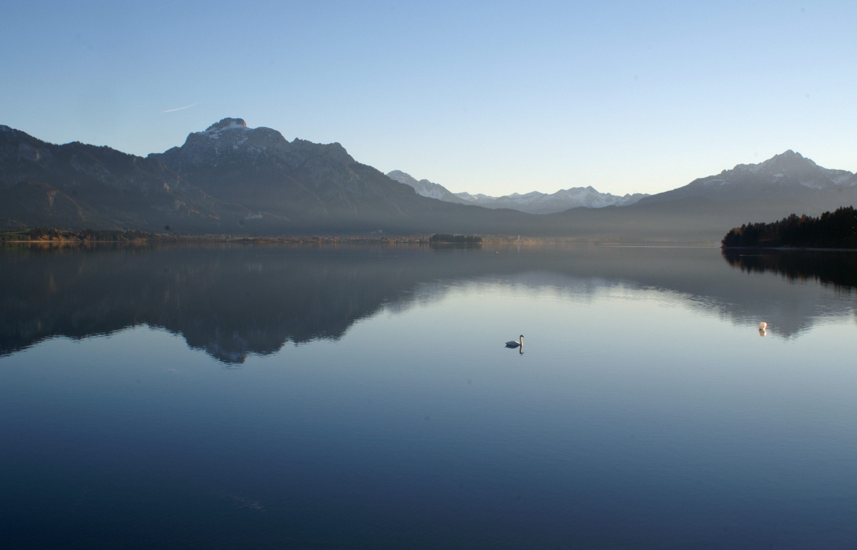 Forggensee